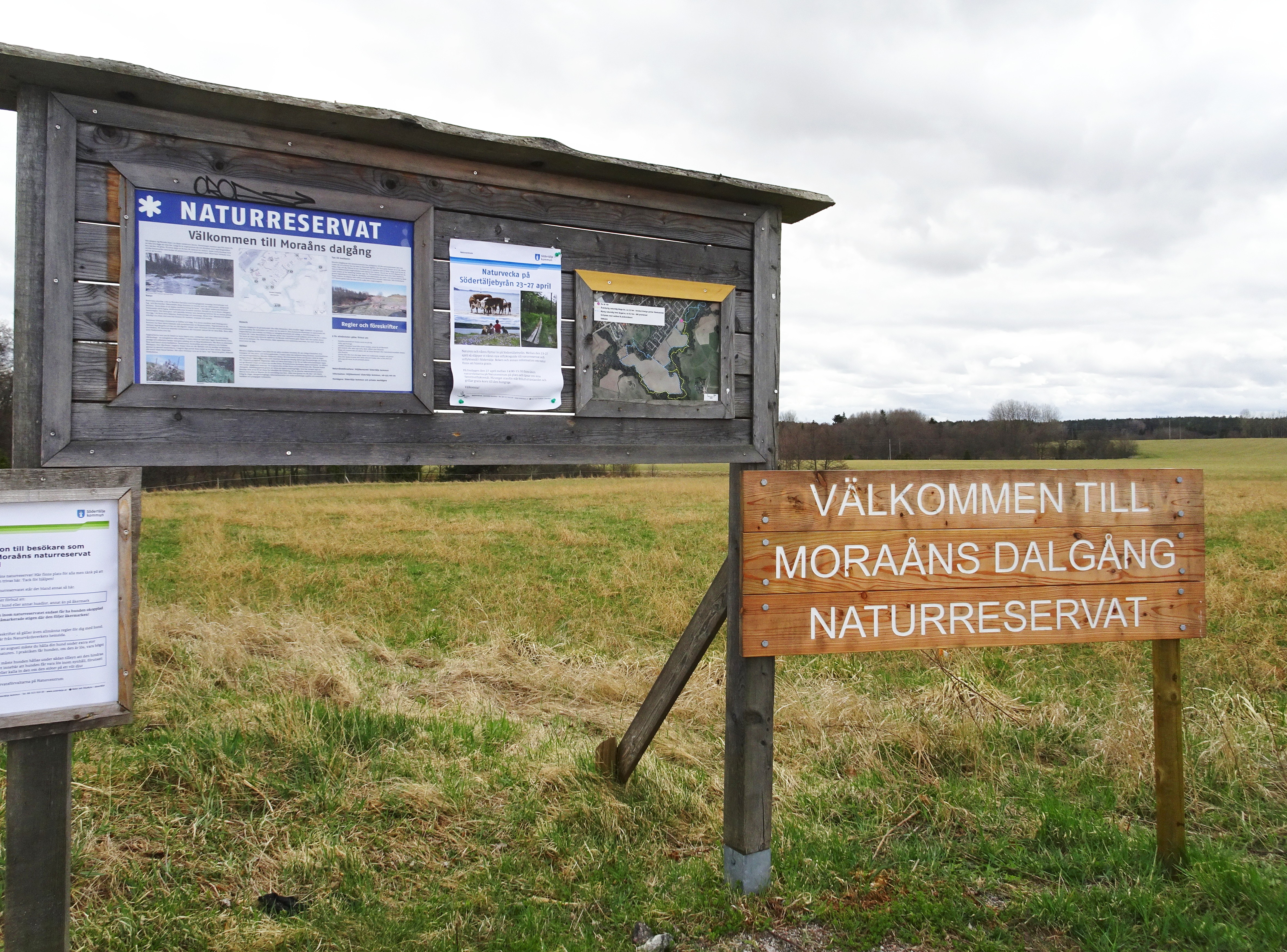 Moraåns dalgång, entré